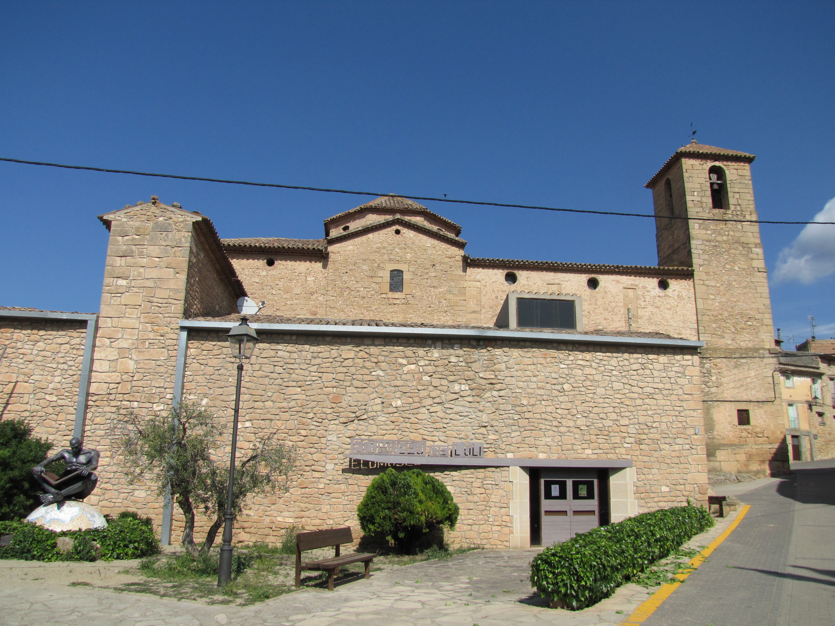 La Pobla de Cèrvoles: ecomuseu de l'oli, Ajuntament i església de Santa Maria, a dalt.